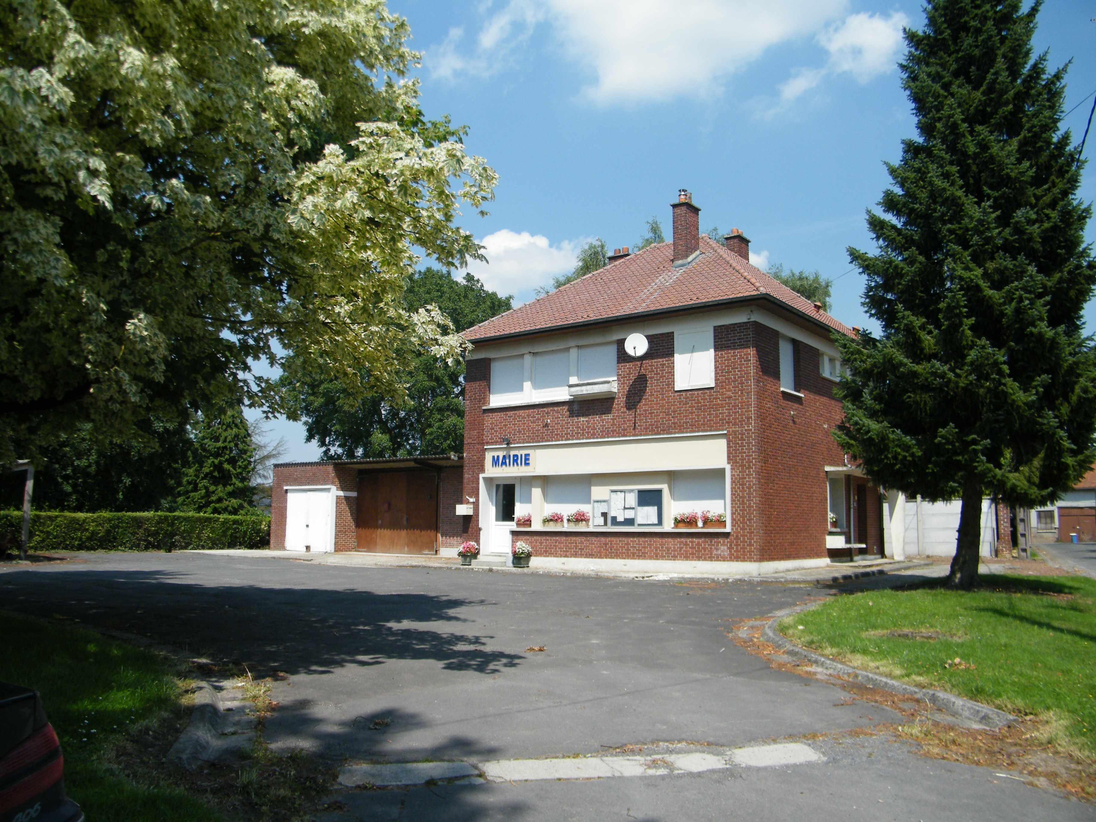 La mairie.